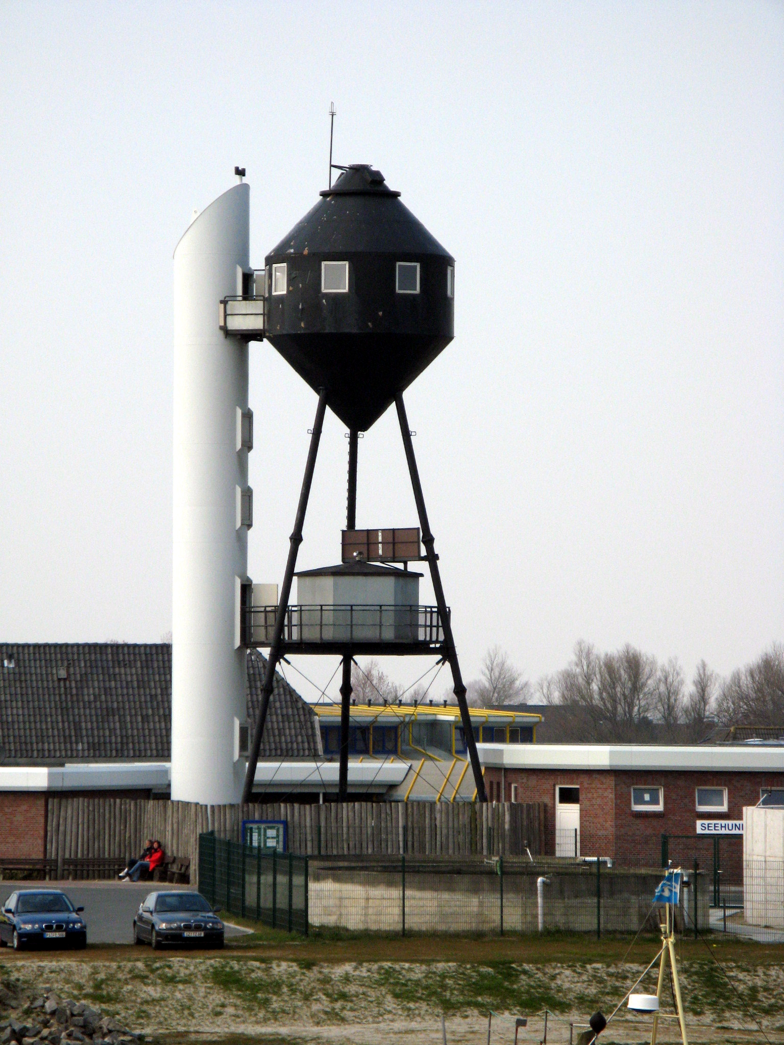 Trischenbake